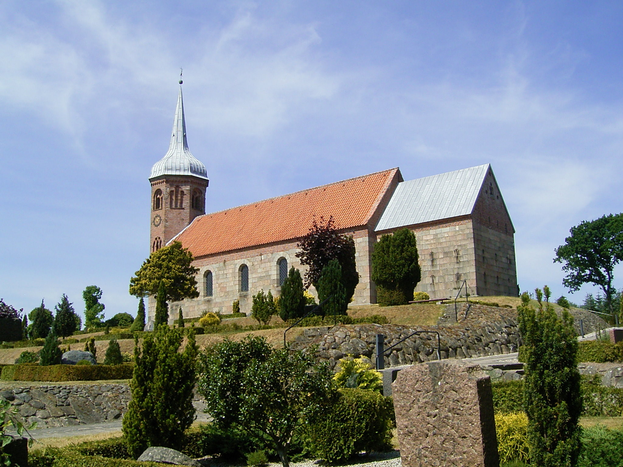 Astrup Kirke, Søvej 3, Astrup 9510 Arden, Mariagerfjord Kommune, Denmark